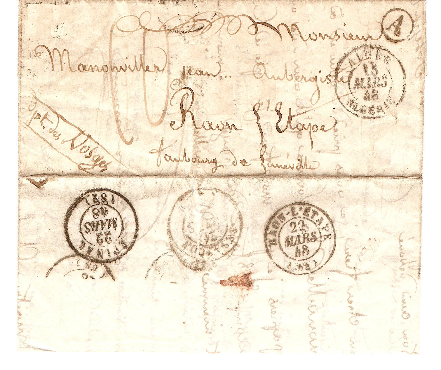 Lettre envoyée d'Alger vers Raon l'Etape